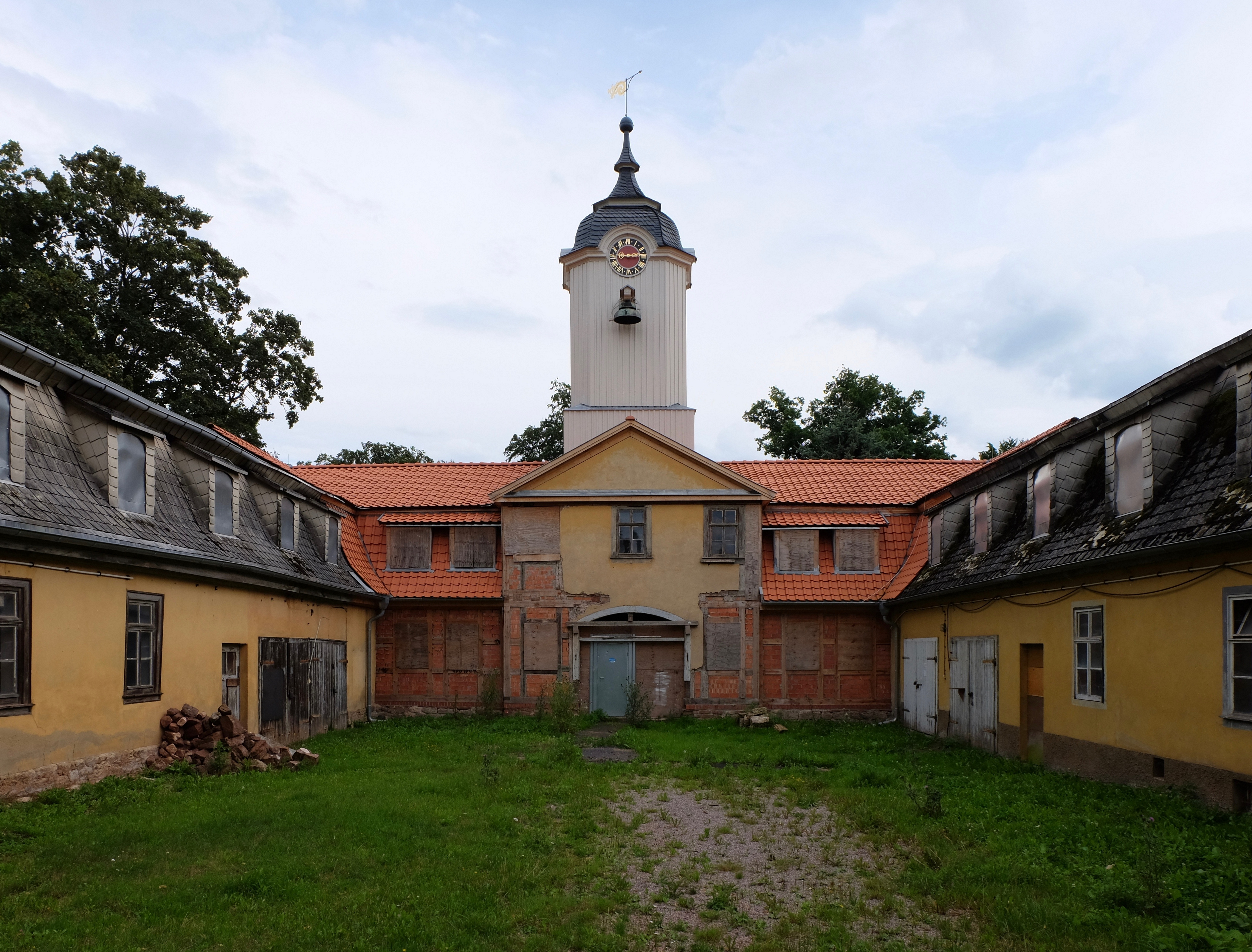 Blick in den Hof des Marstalles